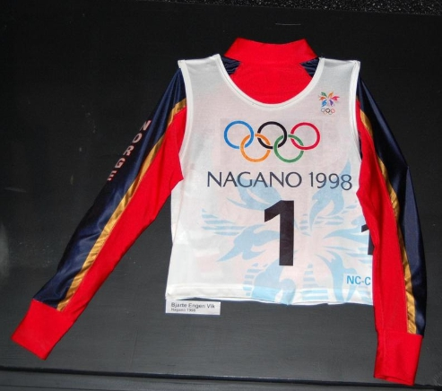 Startnummer Bjarte Engen Vik fra Nagano 1998 på Norges Olympiske Museum